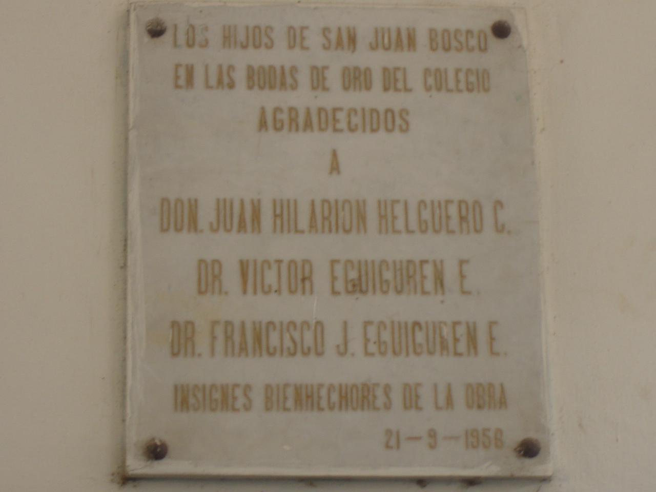 Placa conmemorativa en el zaguán del antiguo Colegio Don Bosco de Piura